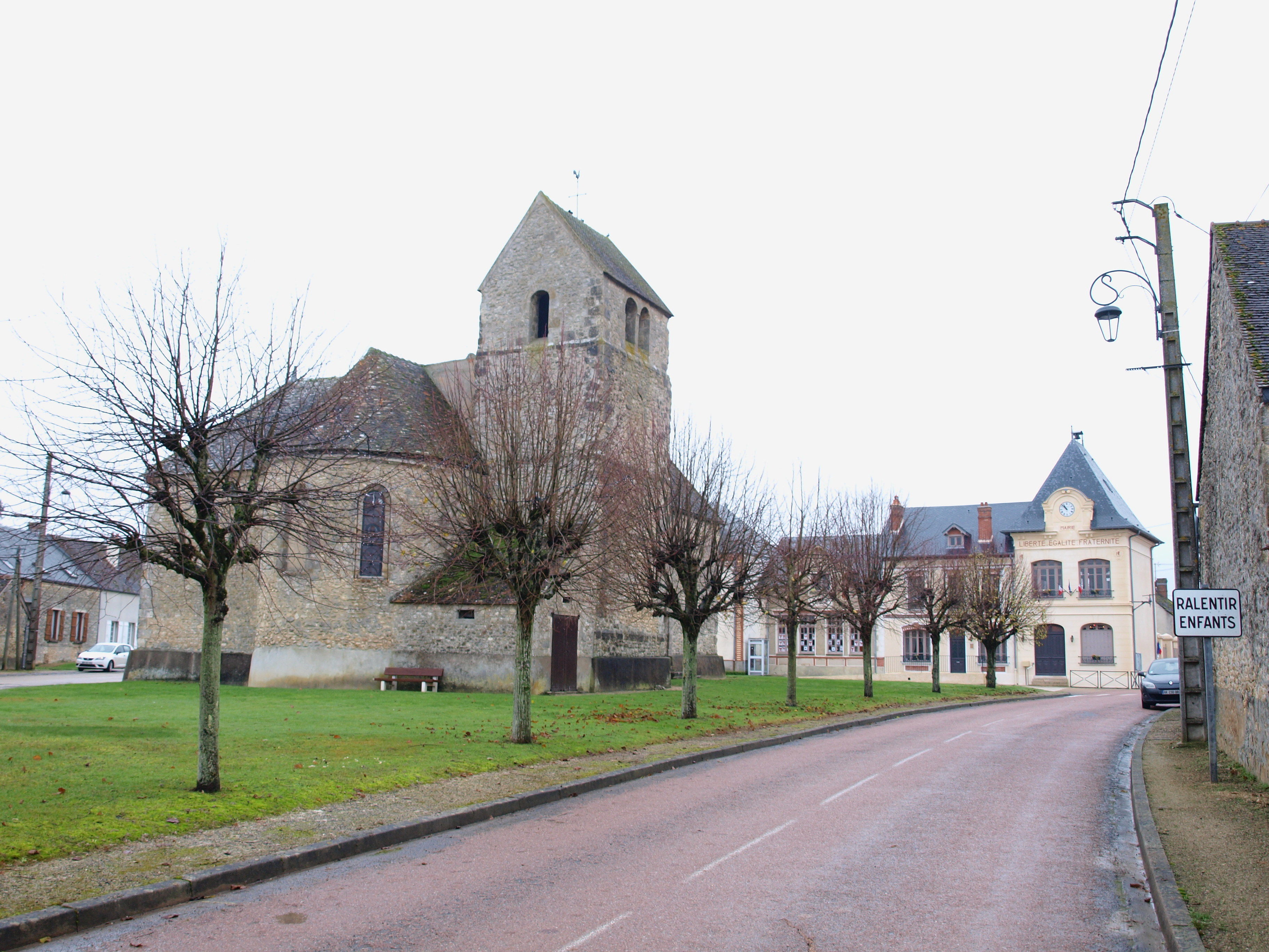 Chevrainvilliers (Seine-et-Marne; France)